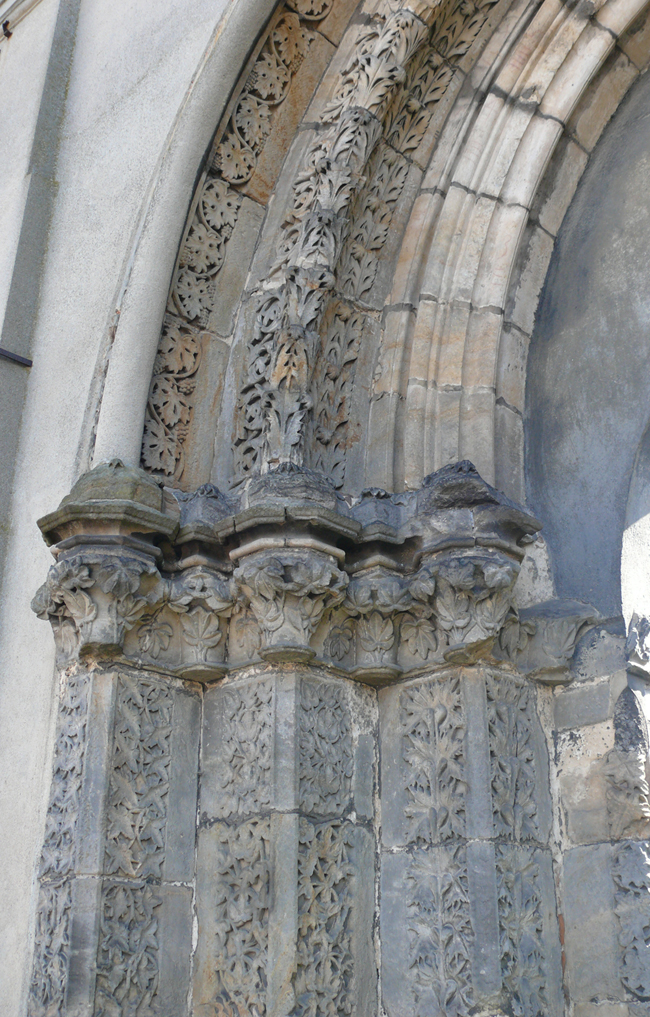 Kloster Hradiště